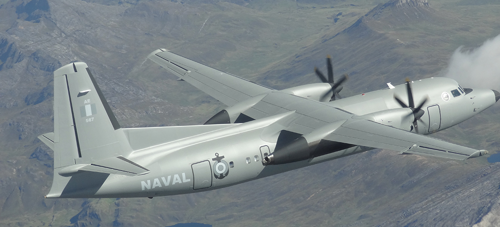 Zo’n 4 jaar geleden vonden 4 Fokker 60’s van het 334 Squadron een nieuw onderkomen in Peru. Vorige maand vertrokken de 2 Fokker 50’s naar dezelfde bestemming. Na een lange etappevlucht van 4 dagen is het luchtmachtsextet herenigd bij het Escuadrón Aeronaval de Exploración no. 11. Vanuit de Peruaanse hoofdstad Lima gaan de laatste Fokkers uit de luchtmachthistorie een zonnige toekomst tegemoet.